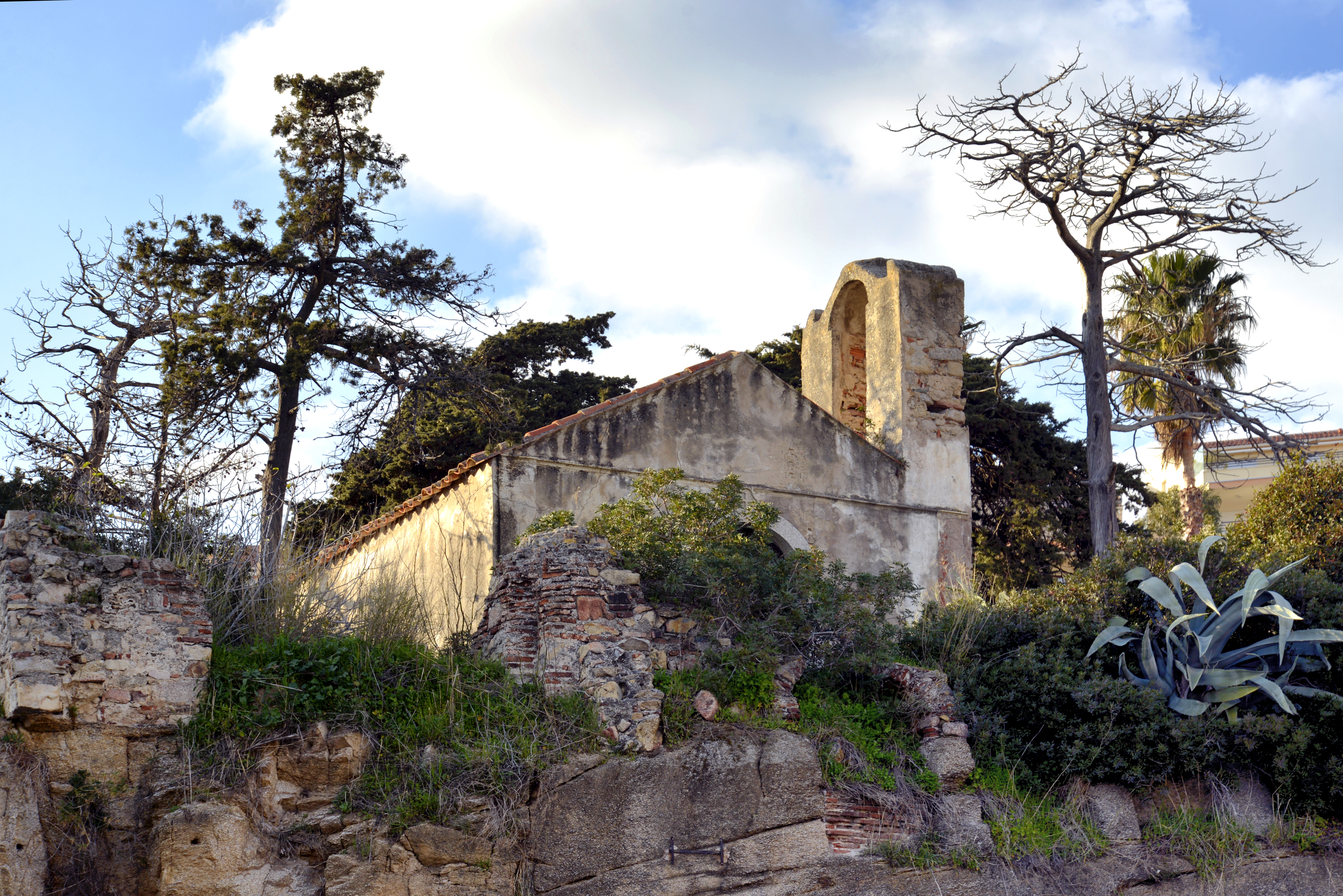 Calvi, Balagne (Corse) - Chapelle Santa Maria Vecchia de Calvi, située en face de la sous-préfecture